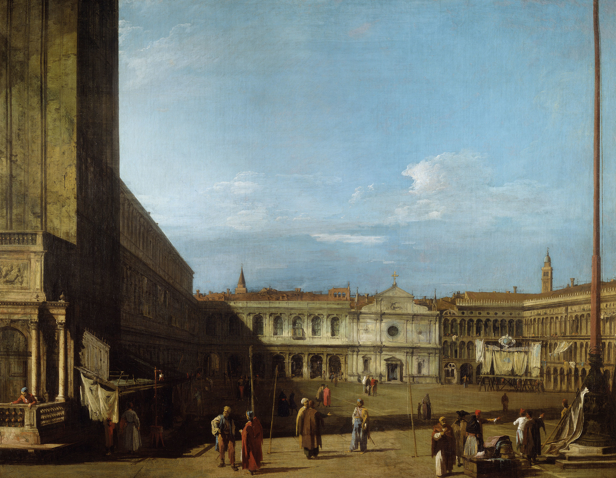 On voit la Place Saint-Marc d'est en ouest quand on regarde vers l'ouest en direction de l'église San Geminiano(église Saint-Géminien). L'église San Geminiano était une église catholique de Venise, en Italie. Here we see Piazza San Marco as we look from East to West, towards San Geminiano, which was a Catholic Church in Venice, Italy.